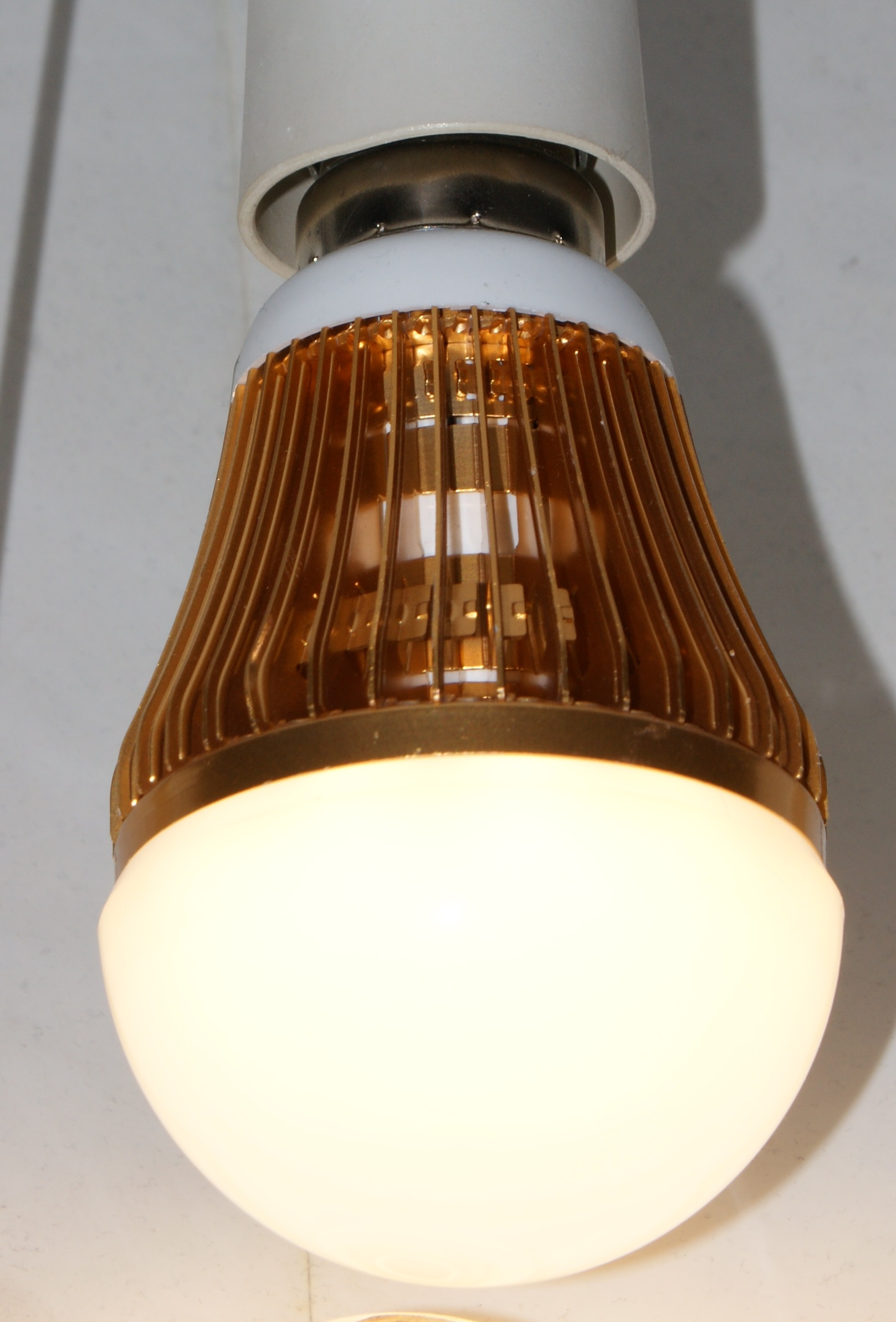 LED žiarovka, 8W svetelný výkon, 14W príkon, 850-950 lm, farba svetla: teplá biela (3500K ±5﹪), stmievateľná